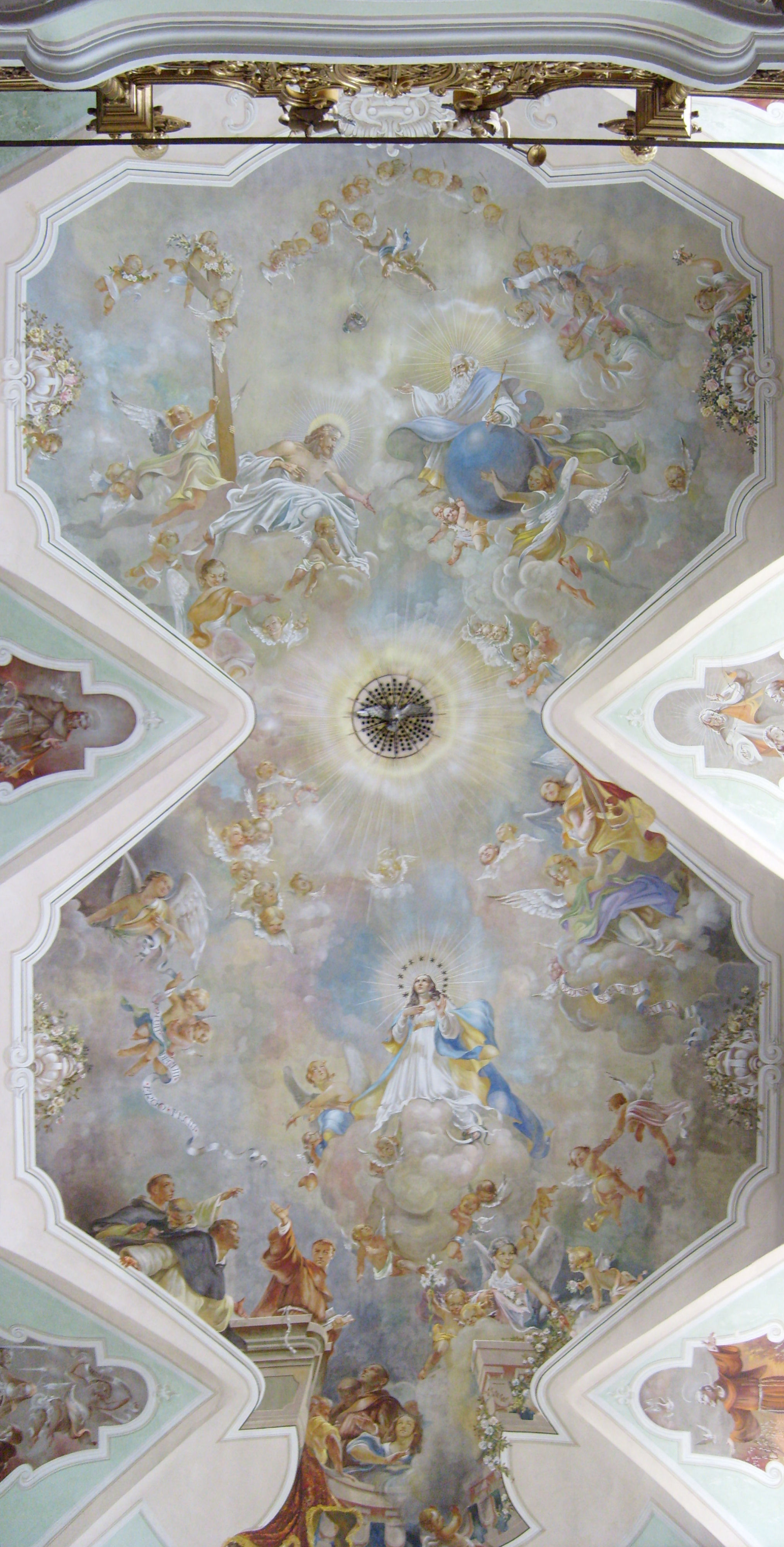 Ceiling of the Franciscan Church in Pápa, Hungary, art by Zoltán Závory A pápai ferences templom mennyezete, Závory Zoltán alkotása